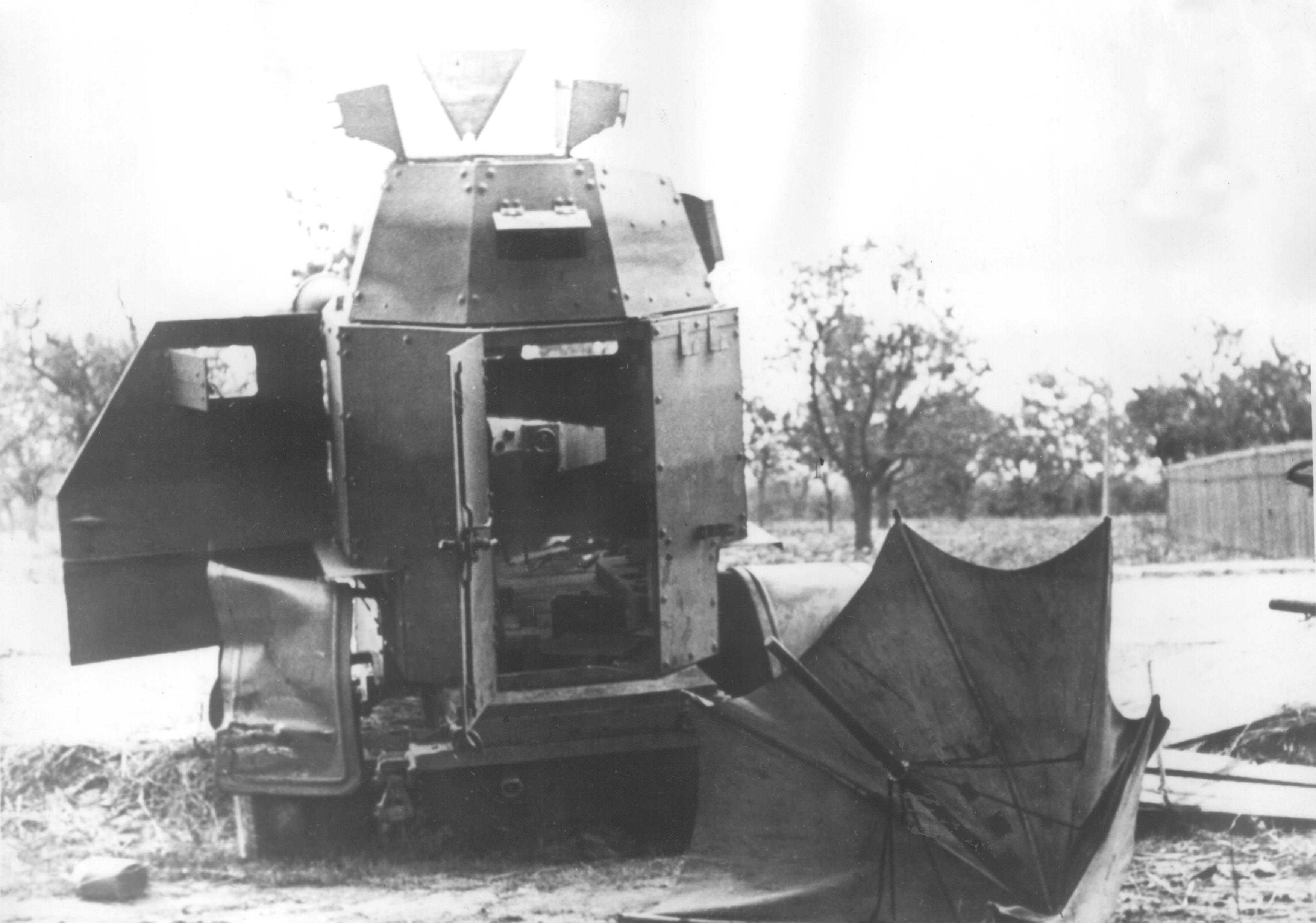 Zniszczony polski samochód pancerny wz. 34 na Saskiej Kępie w Warszawie.